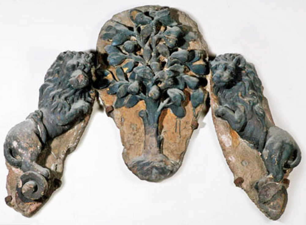 Hauszeichen des ehemaligen Gasthofs Zum Birnbaum in Leipzig (später Hotel de Pologne)